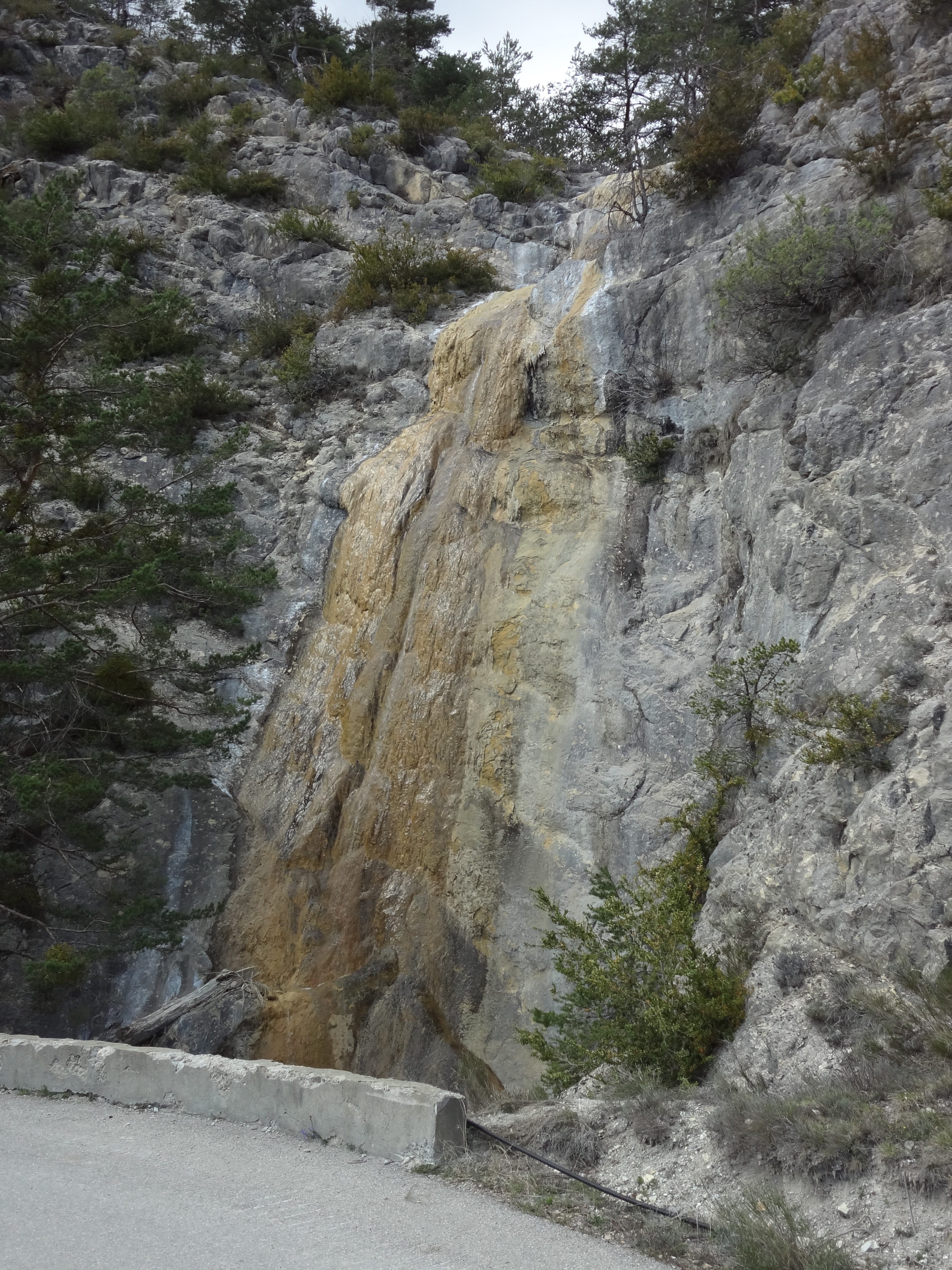 sur le bord de la D 10, une cascade